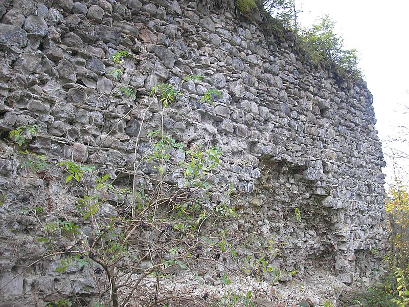 Burg Nesselburg (Nesselwang, Landkreis Ostallgäu, Bayerisch-Schwaben). Schildmauer vom Burghof. Eigene Aufnahme, Okt. 2006 / Nesselburg castle above Nesselwang near Kempten (Bavaria, Germany). Shield wall, seen from inside. Own photo, Oct. 2006